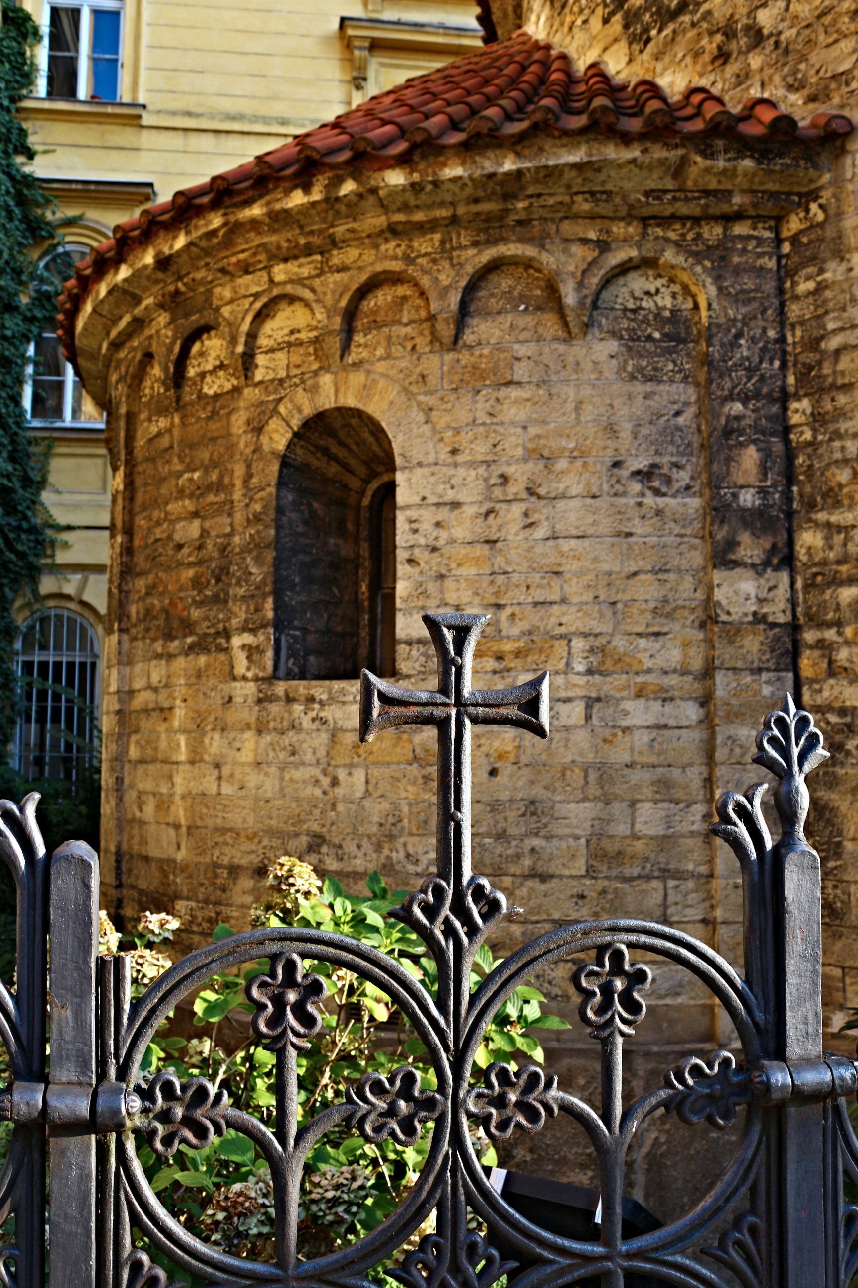 Staré Město, rotunda Nalezení sv. Kříže